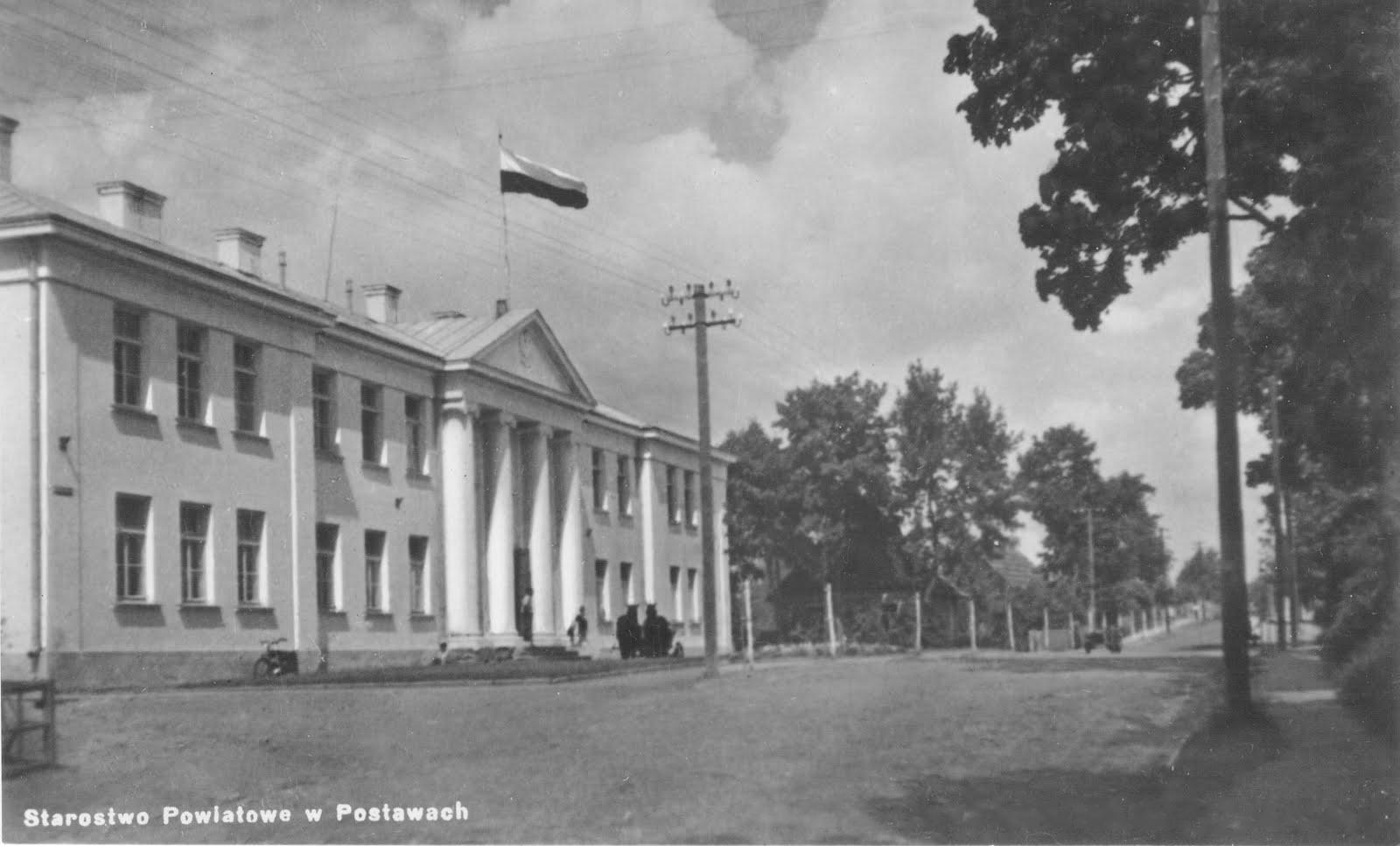 Беларуская (тарашкевіца): Паставы (Pastavy), вуліца Віленская (vulica Vilenskaja). Староства